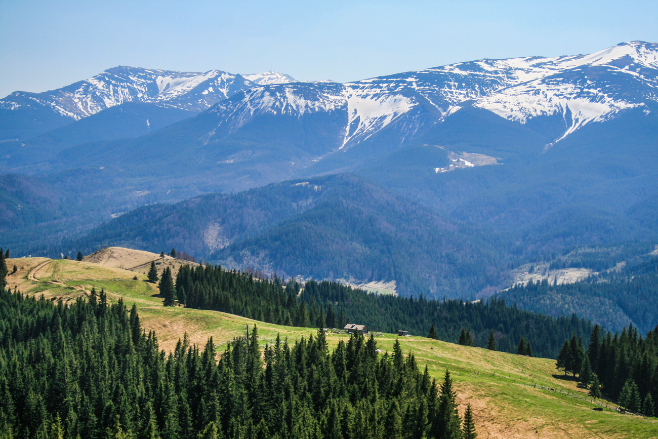 Травнева Чорногора.